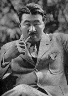 横尾泥海男、1920年代の写真